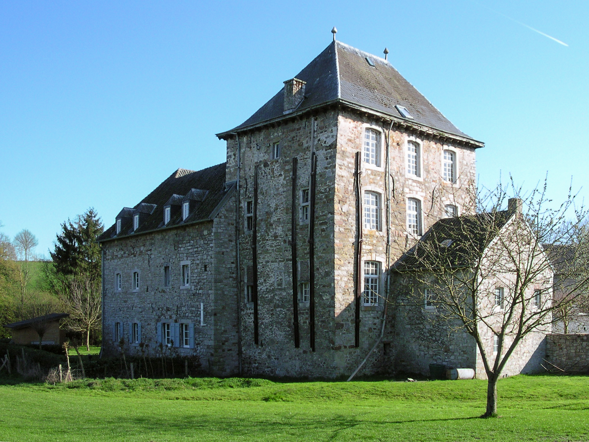 Brandenburg in Aachen Sief, gesehen vom Baumgartsweg. Die stabilisierenden Stangen aus den 1950er Jahren sollen in den nächsten Jahren durch eine gründliche Sanierung des Baus überflüssig werden. Außerdem ist geplant, den Wassergraben wieder herzustellen.